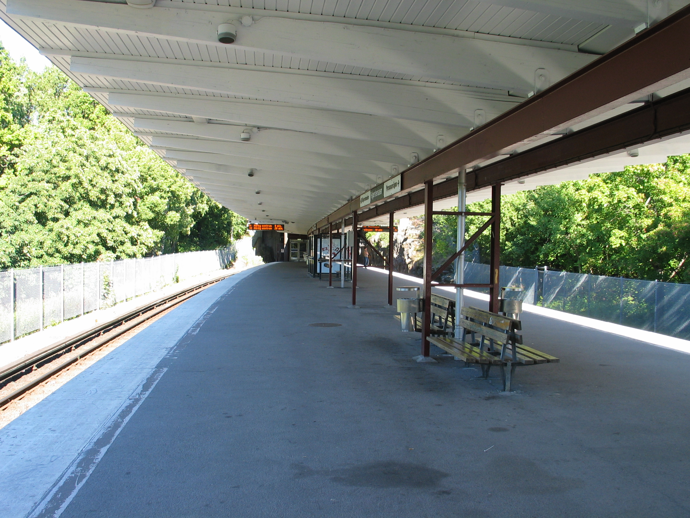 Hägerstensåsen, a metro station in Stockholm, Sweden.